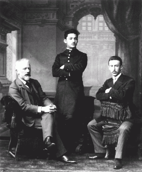 Վարդան Արղության-Երկայնաբազուկը Չայկովսկու և Կոնրադի հետ